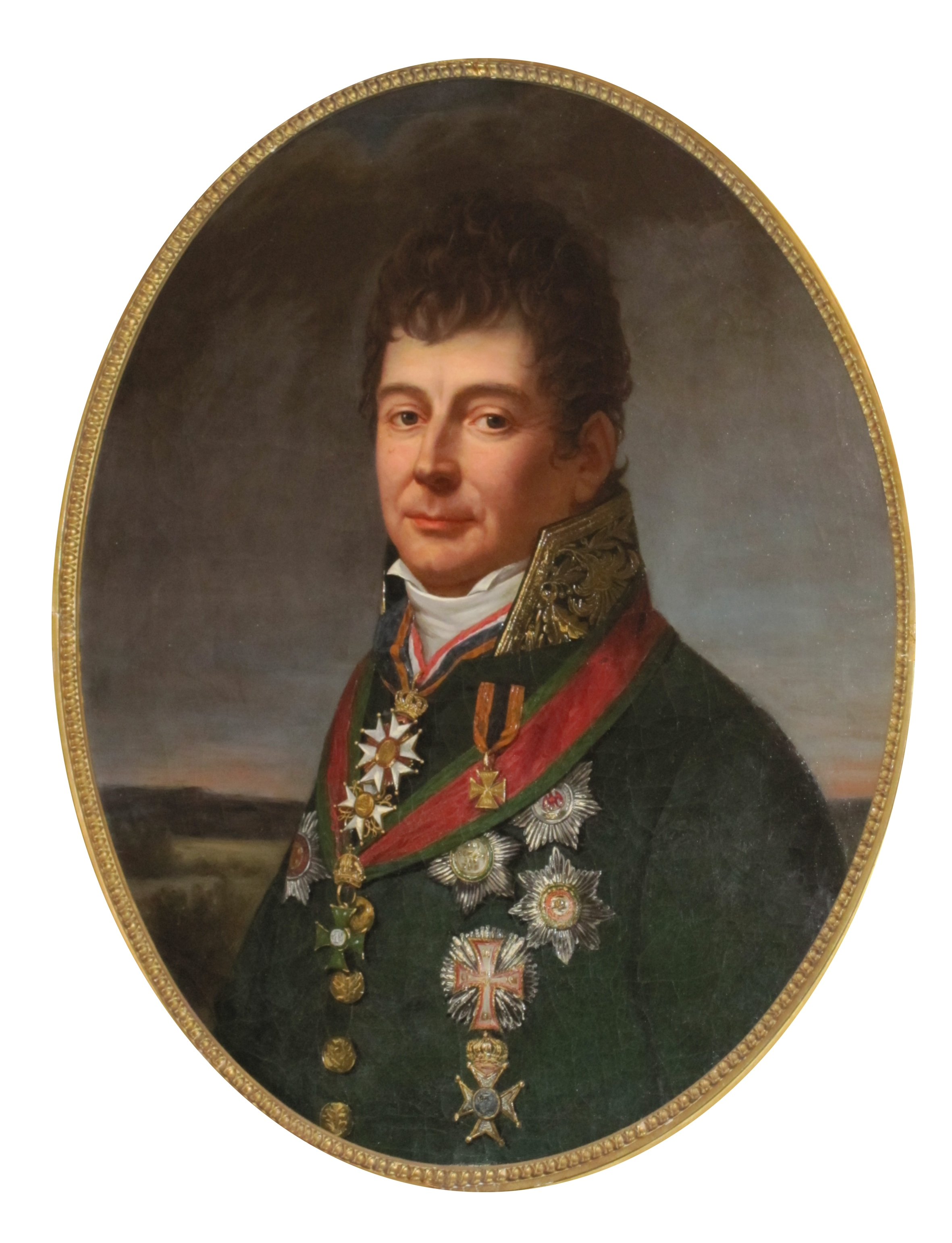 Ölbild